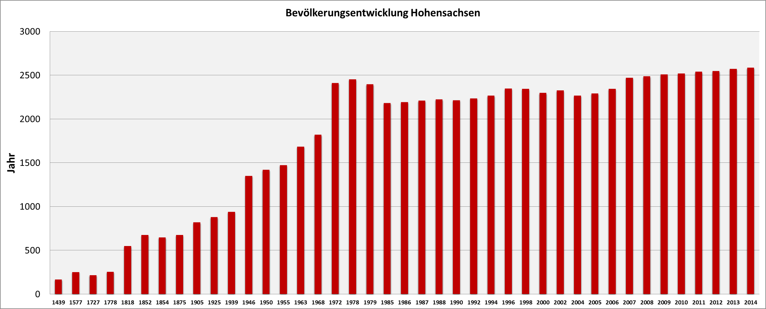 Bevölkeruungsentwicklung des Ortsteils Hohensachsen. Stand 2015